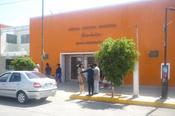 fachada principal